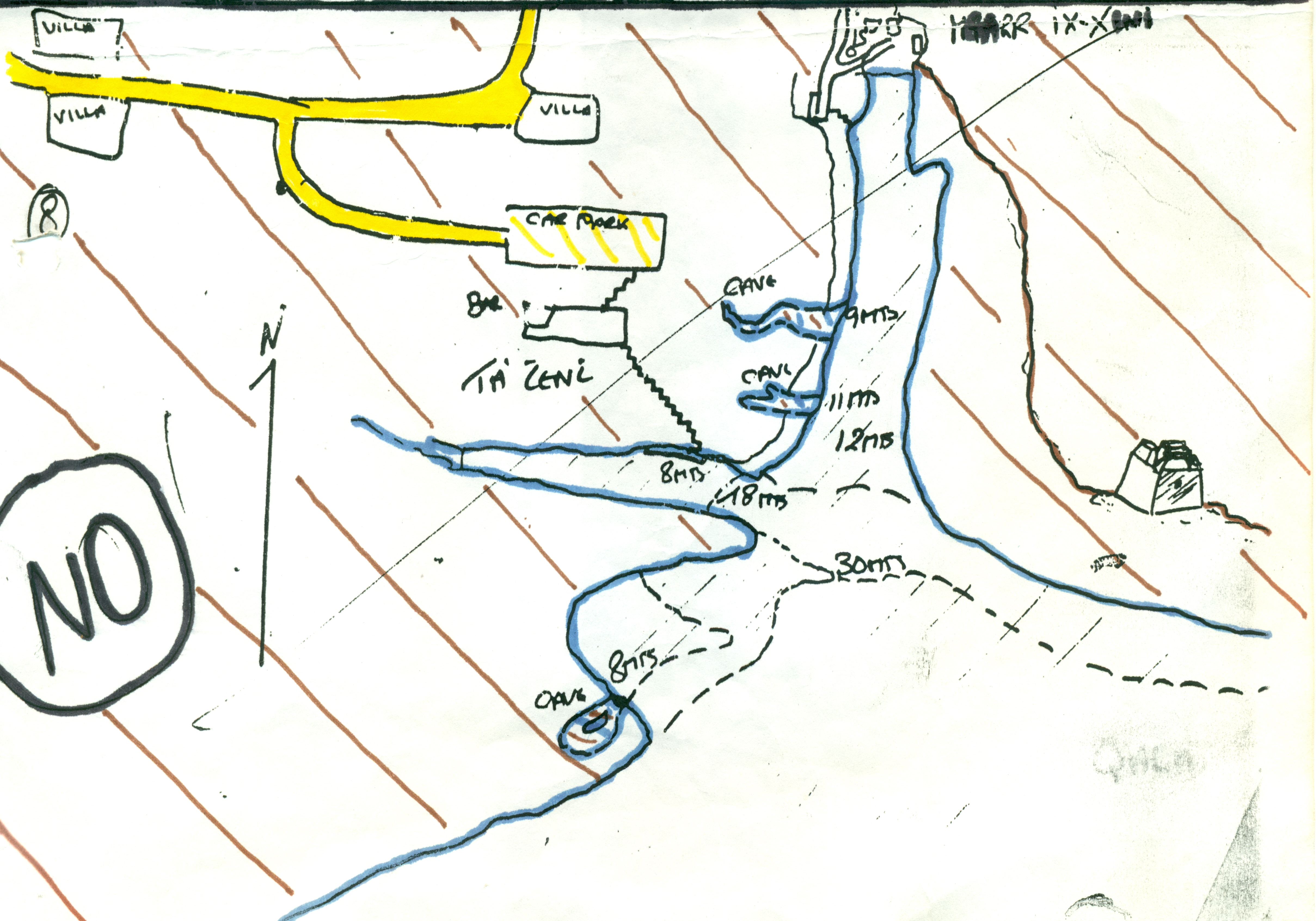 Skizze Mgarr ix-Xini